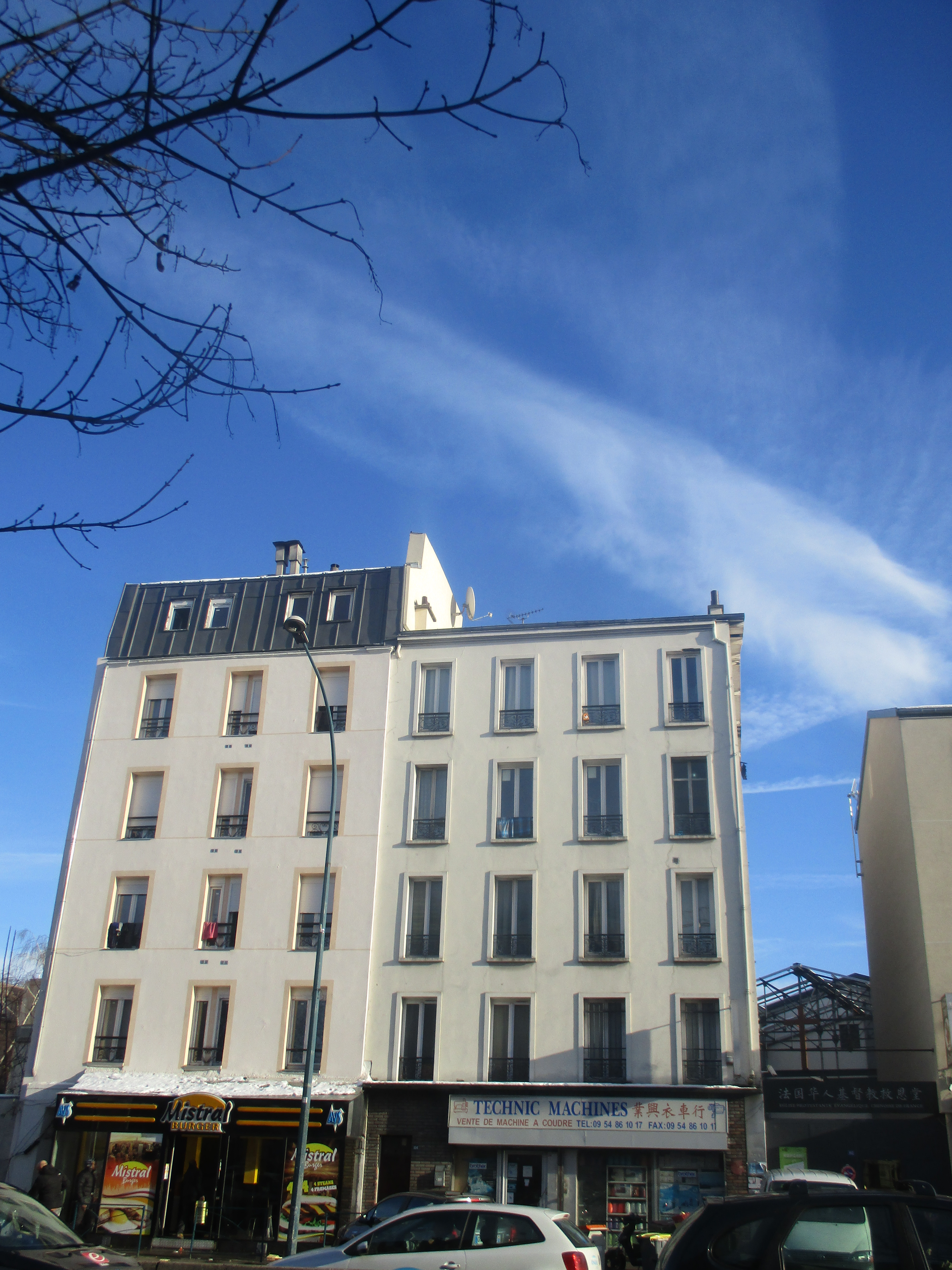 104 avenue Jean-Jaurès à Pantin dans la Seine-Saint-Denis.